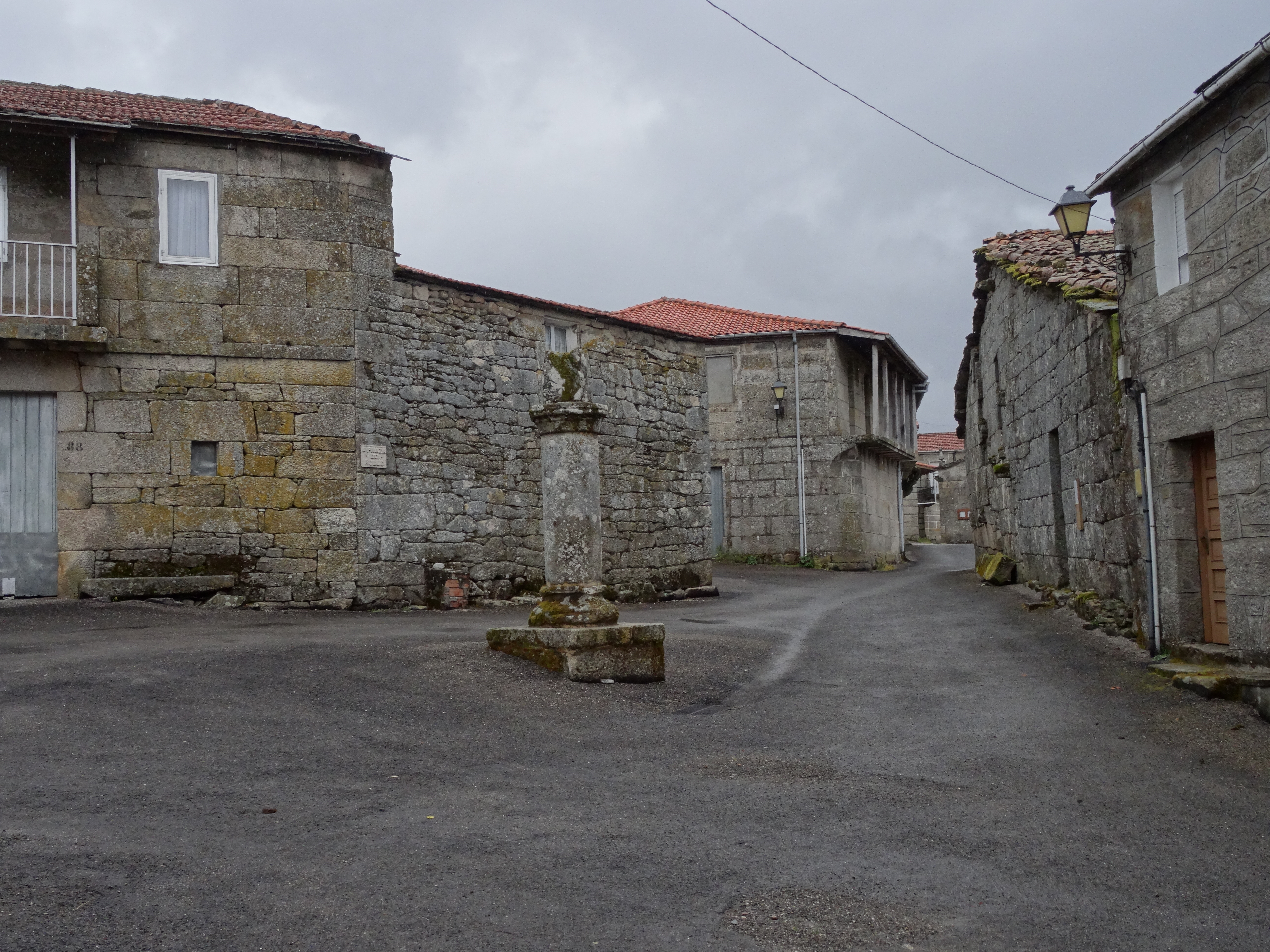 Ver título.